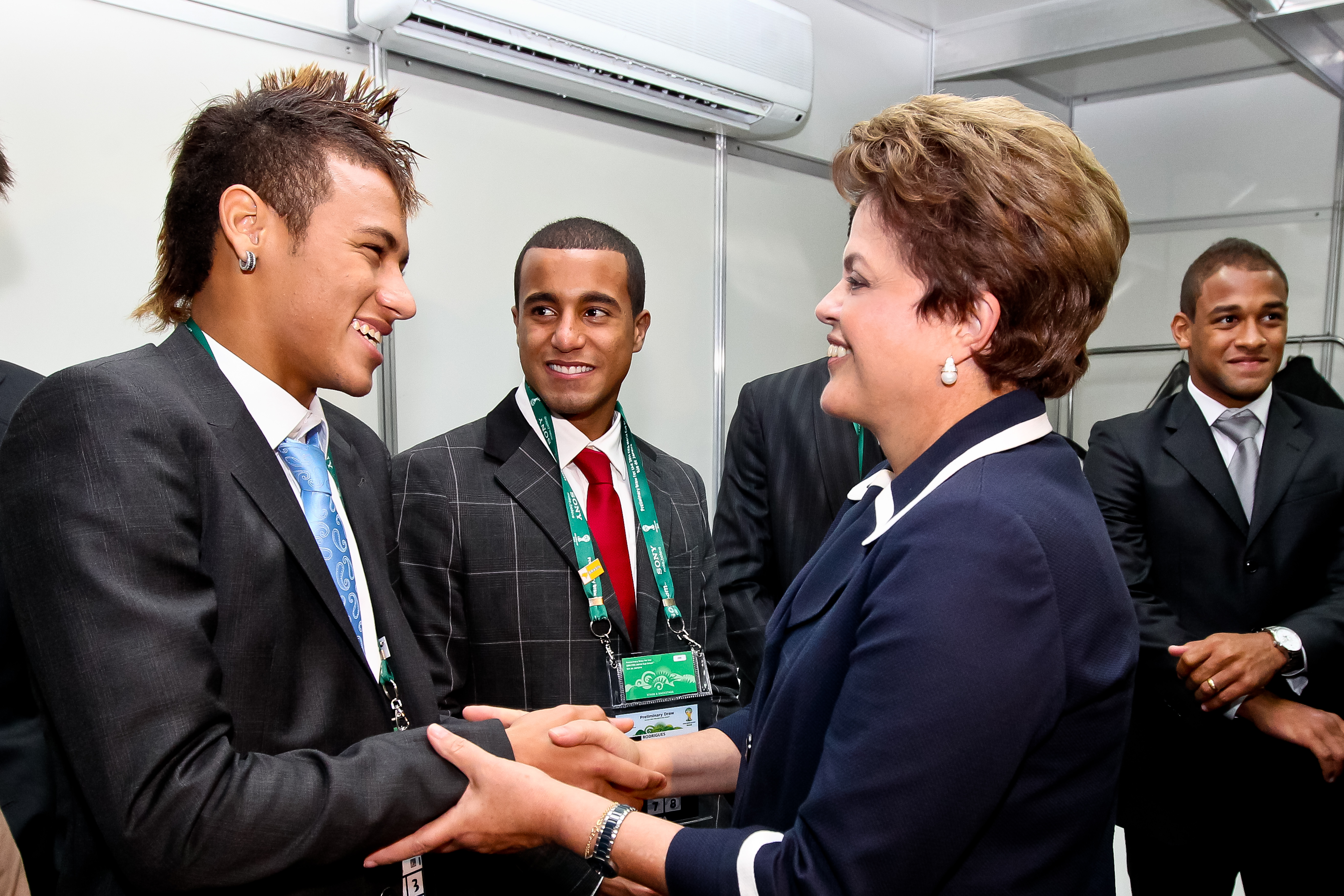 Presidenta Dilma Rousseff cumprimenta o jogador Neymar após o sorteio preliminar da Copa do Mundo da Fifa Brasil 2014 (Rio de Janeiro,RJ,30/07/2011) Foto: Roberto Stuckert Filho/PR